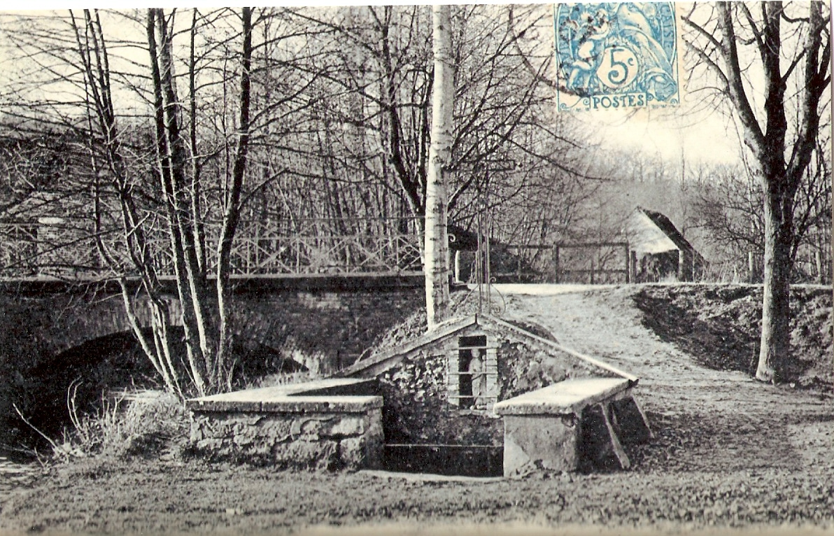 Cette photo montre la fontaine de Verlin avant le vol de la statue